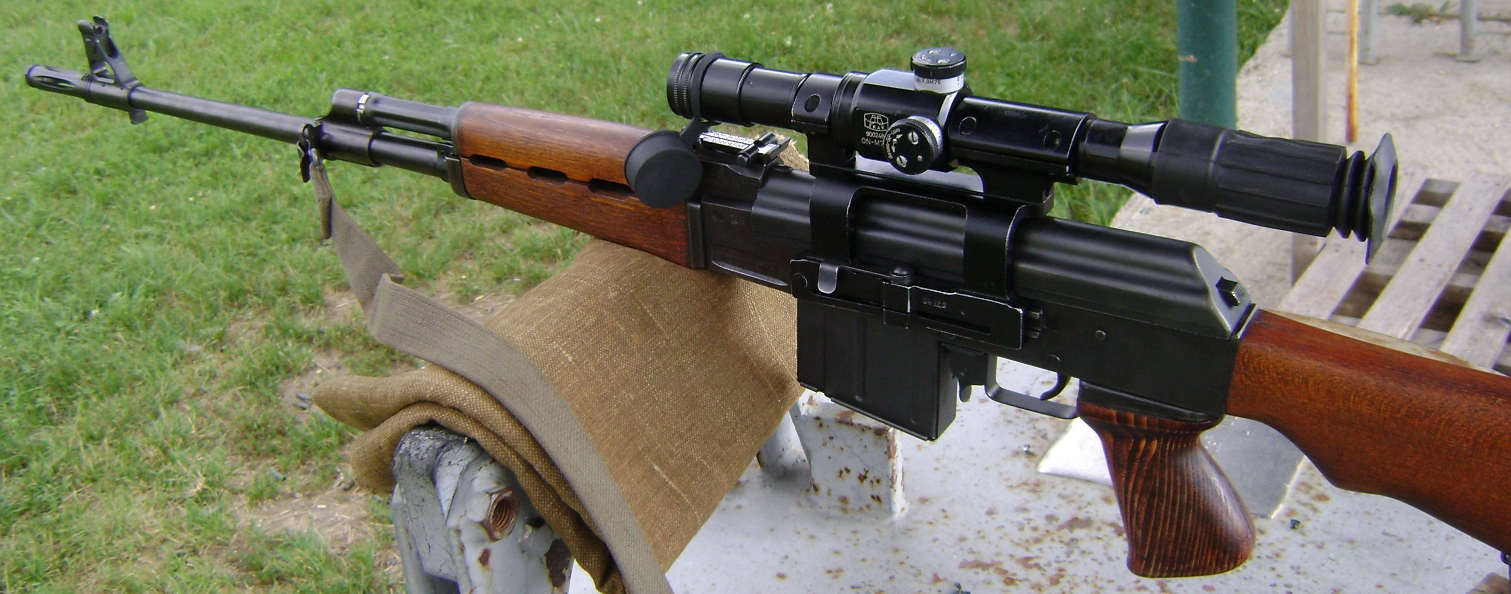 ZASTAVA M76 počas nastreľovania v júli 2010